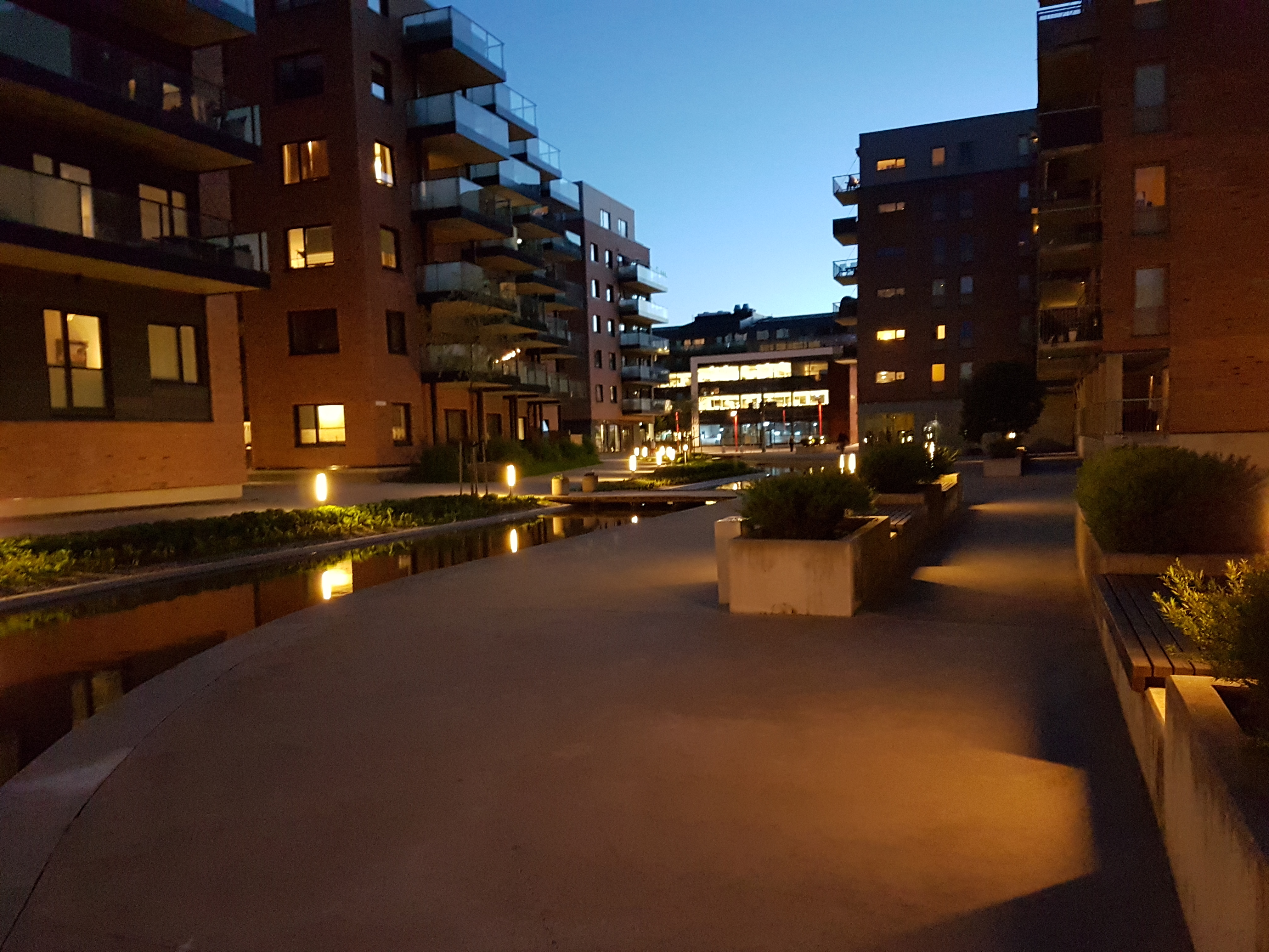 Vannspeilet by night